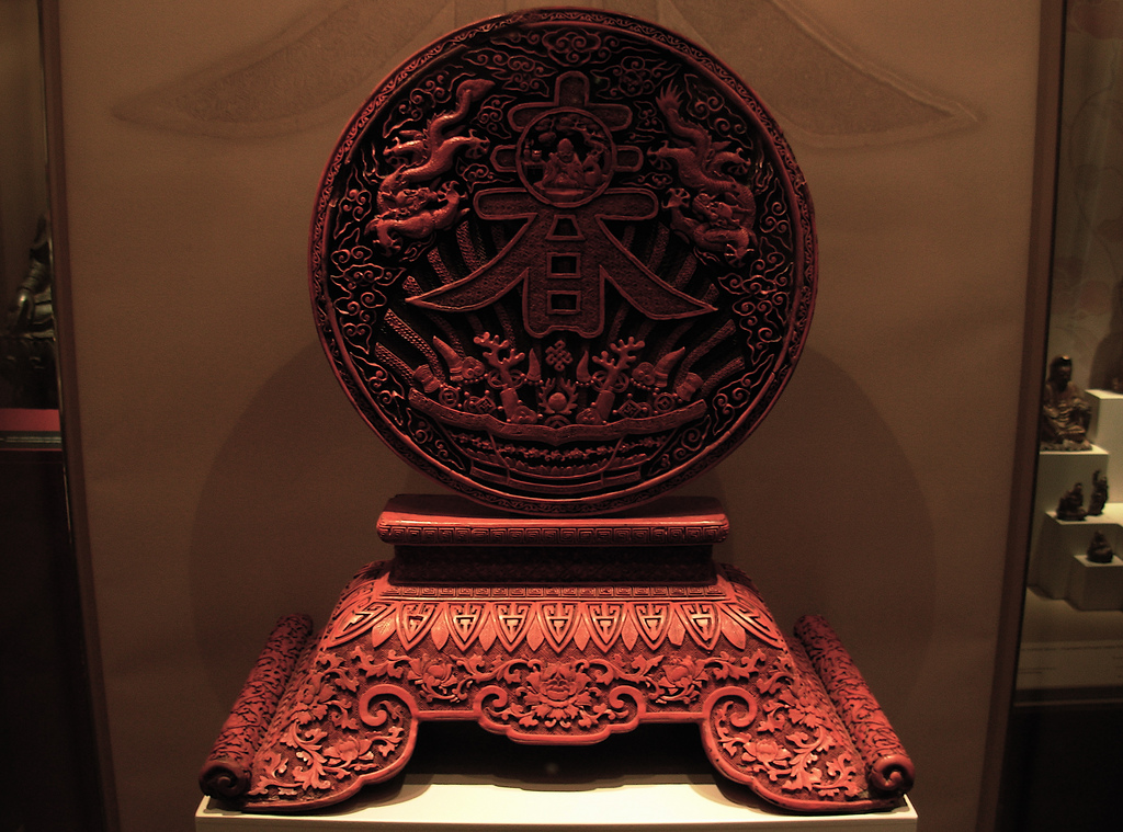 Γλυπτό του Μουσείου Ασιατικής Τέχνης.